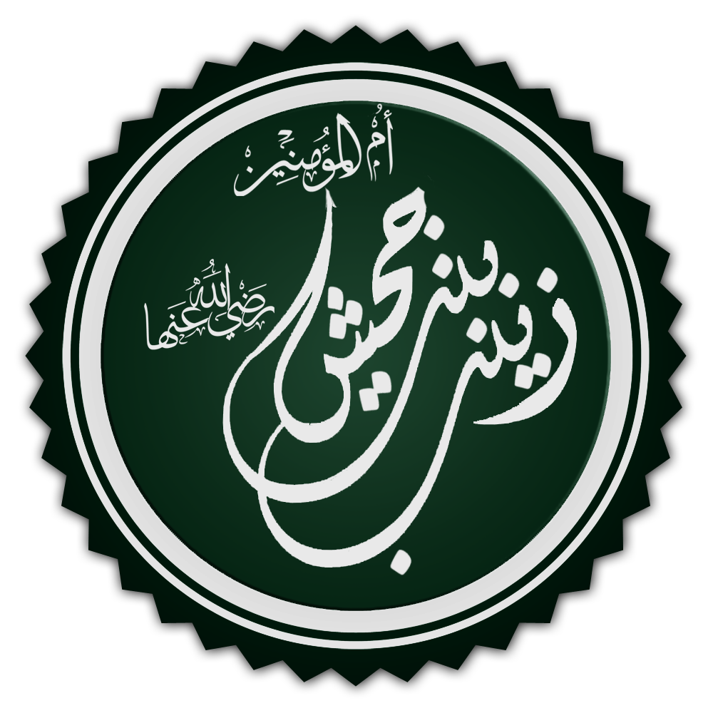 تخطيط كلمة م المؤمنين زينب بنت جحش رضي الله عنها